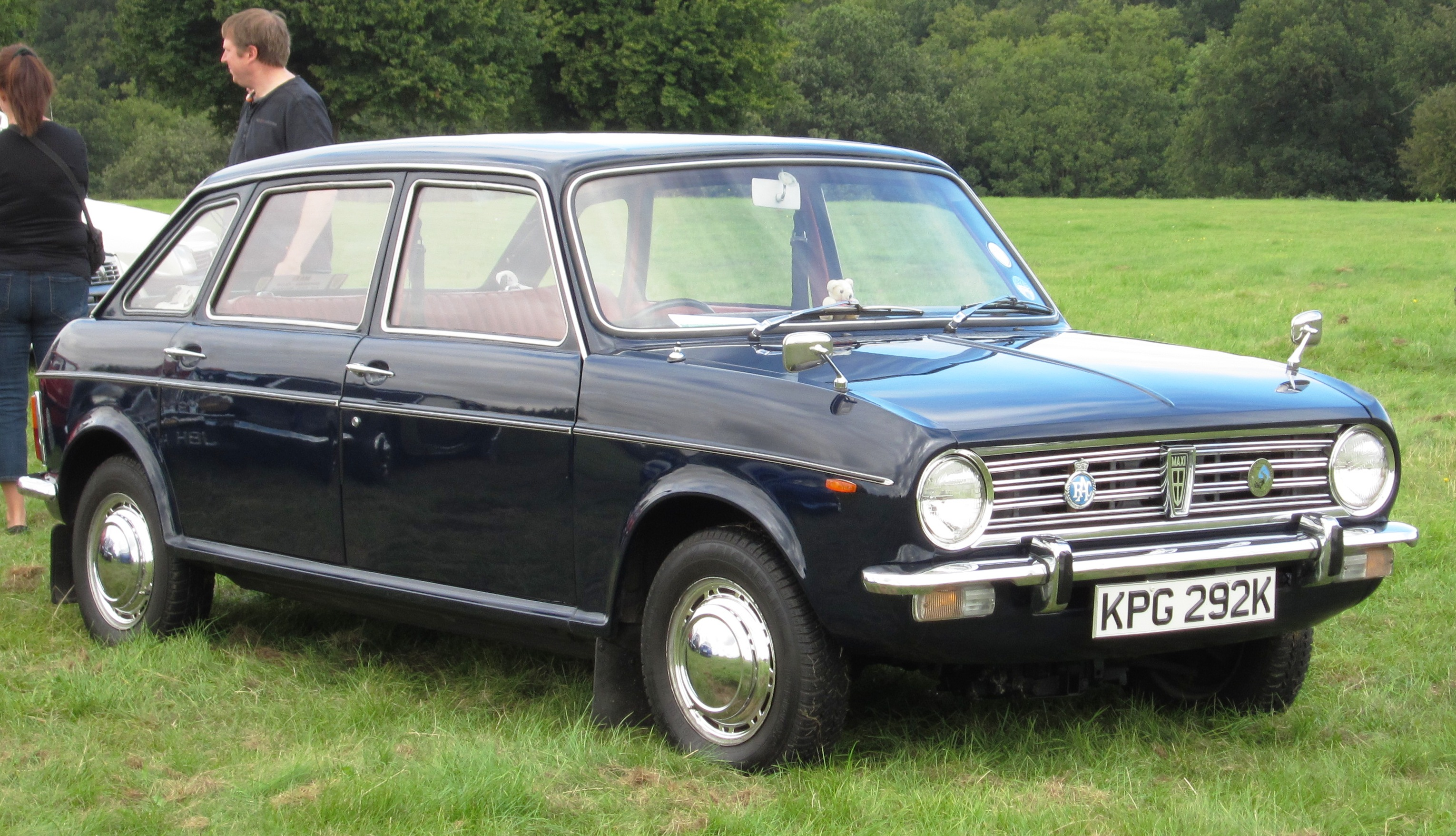 Austin Maxi 1500